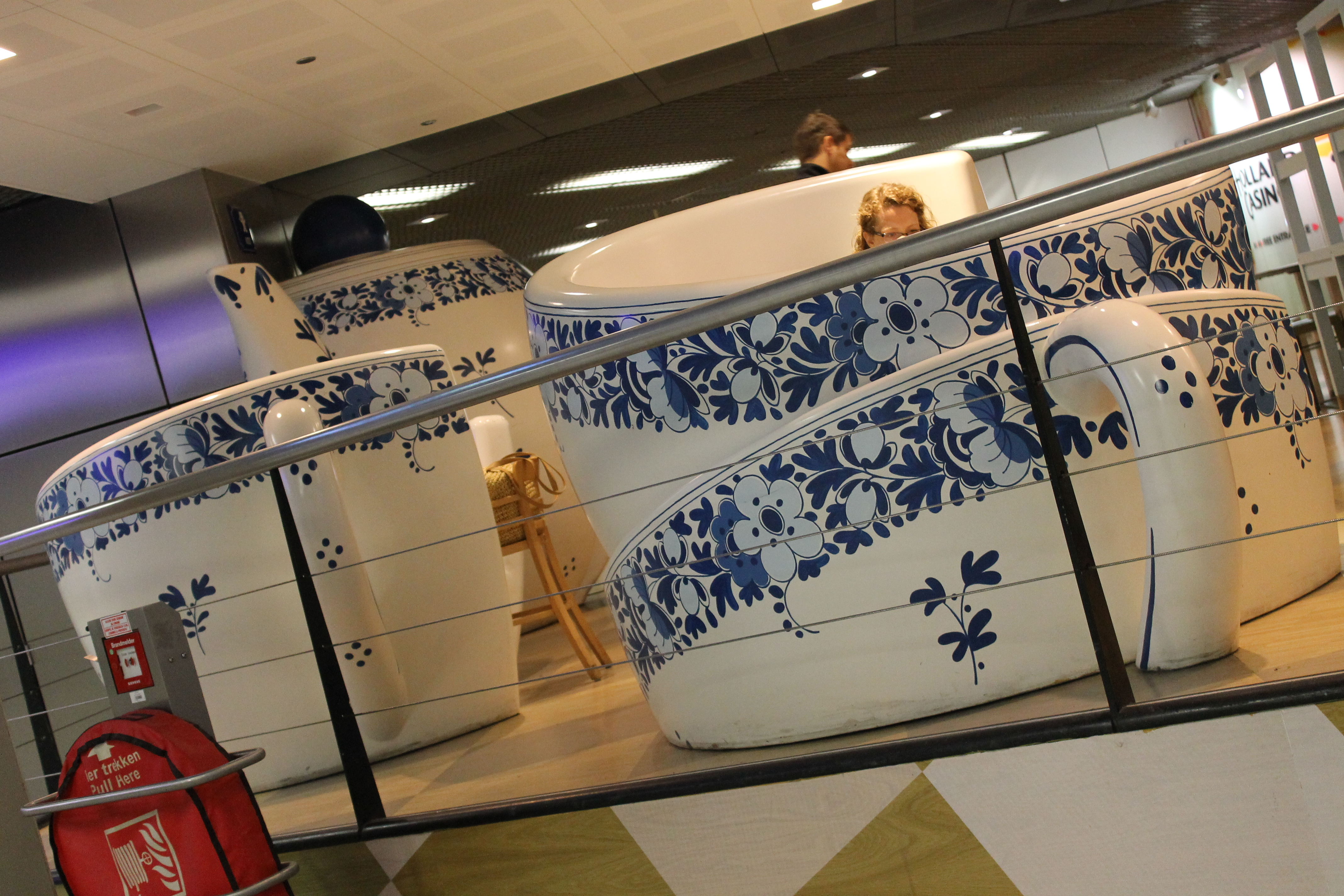 Restaurante en el aeropuerto de Amsterdam Schiphol